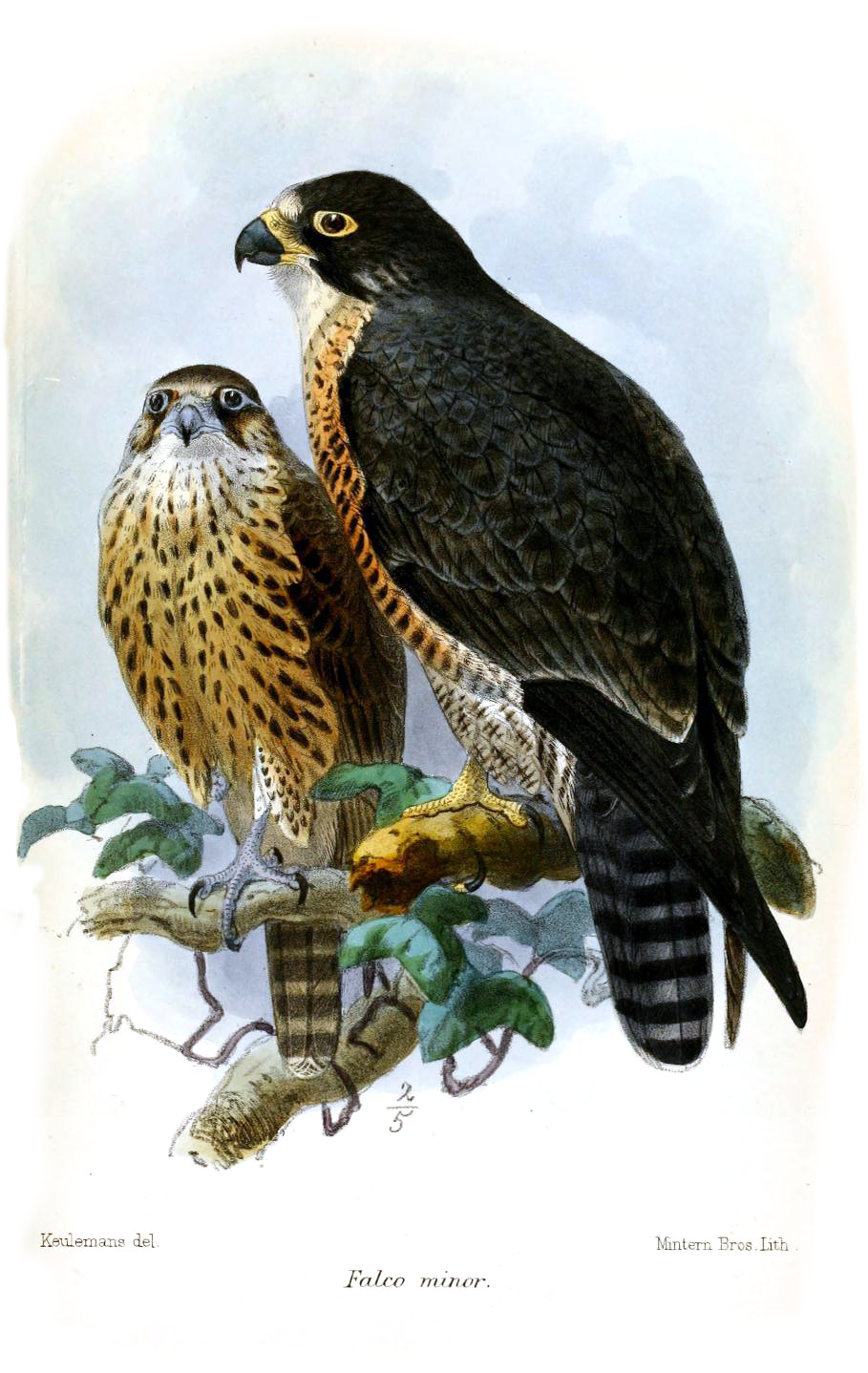 Falco minor = Falco peregrinus minor, Peregrine Falcon ssp.